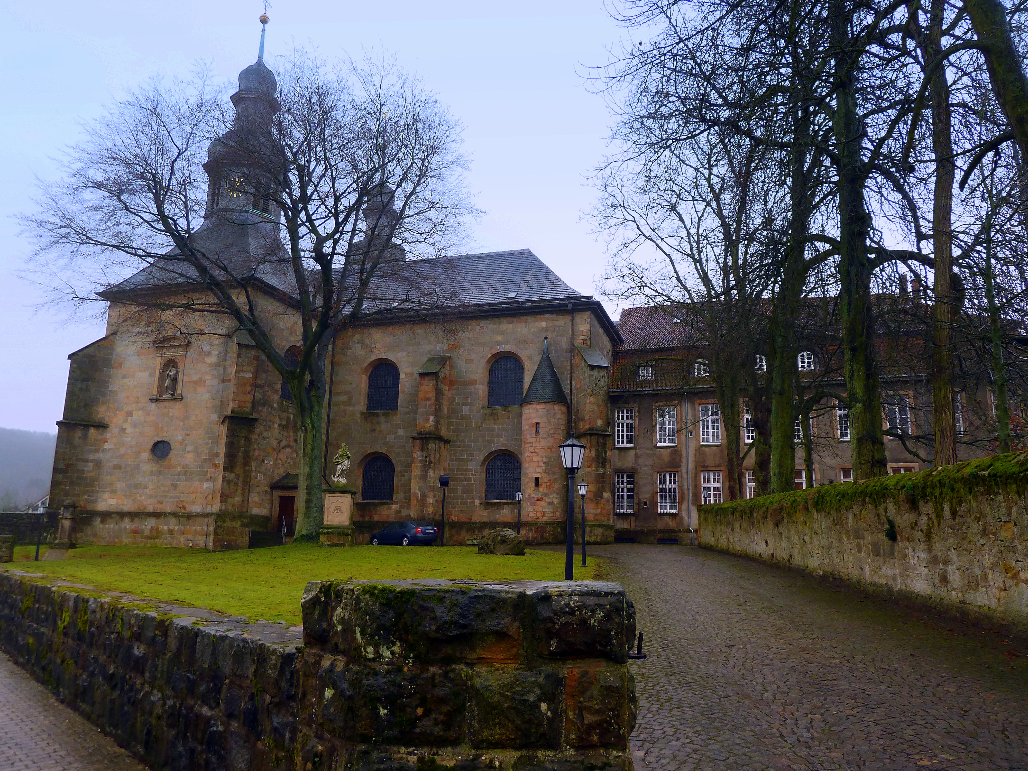 Willebadessen - St. Vitus, die kath. Pfarrkirche war früher die Klosterkirche der Benediktinerinnen